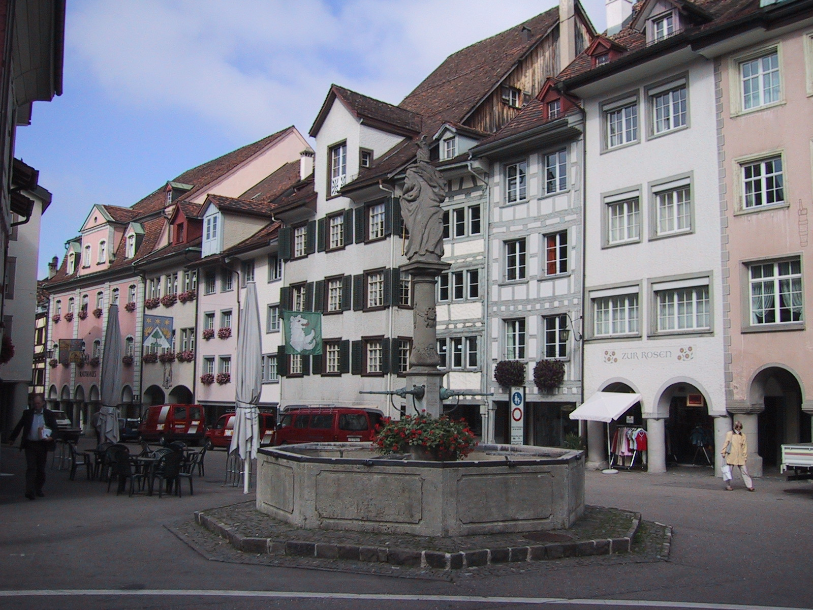 Altstadt von Wil, Kanton St. Gallen.